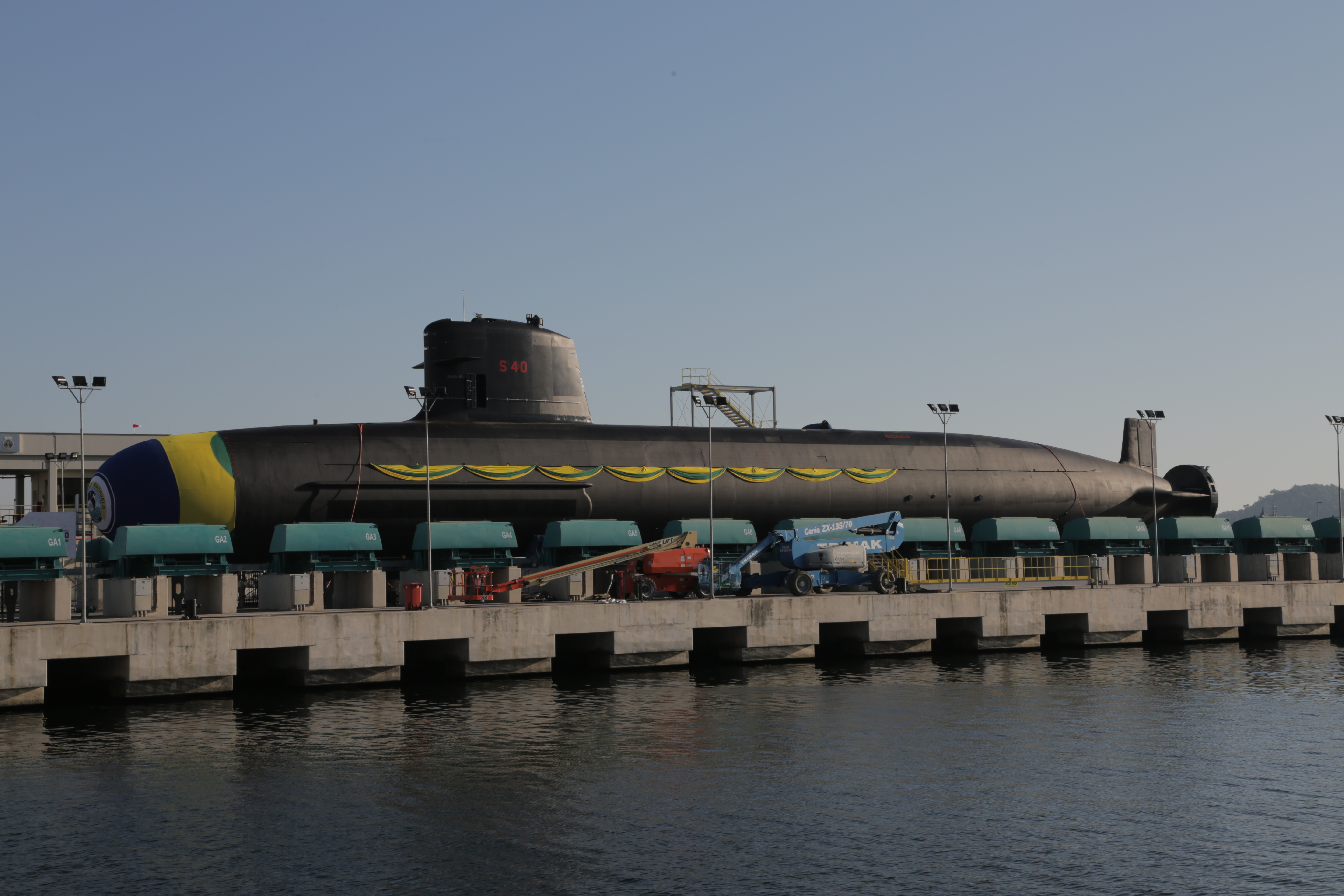 Arquivo liberado pela Marinha do Brasil através de projeto GLAM com Wiki Educação Brasil